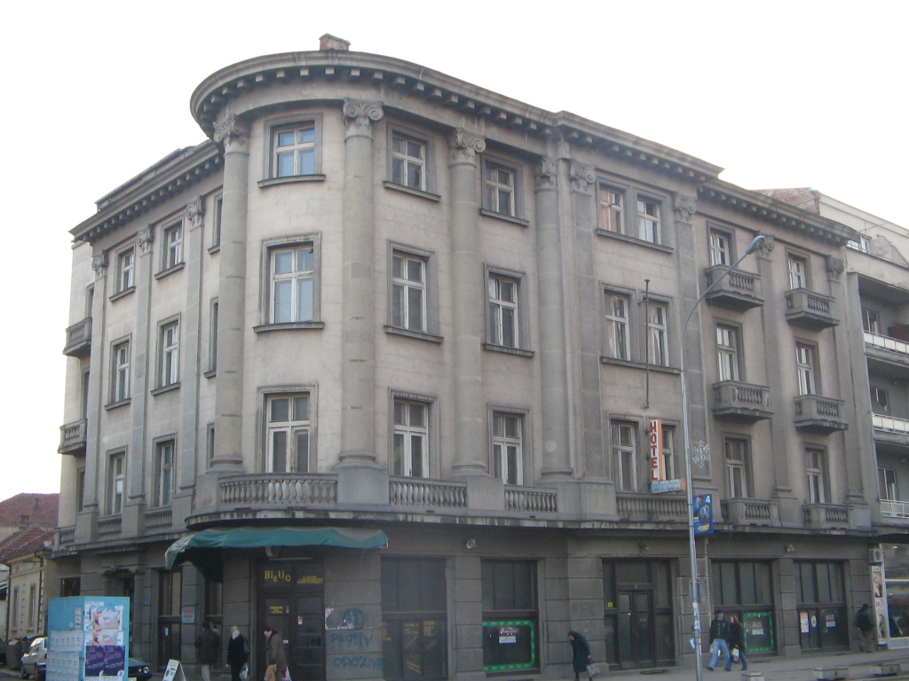 Dubočica hotel in Leskovac, Serbia/L'hôtel Dubočica à Leskovac, Serbie